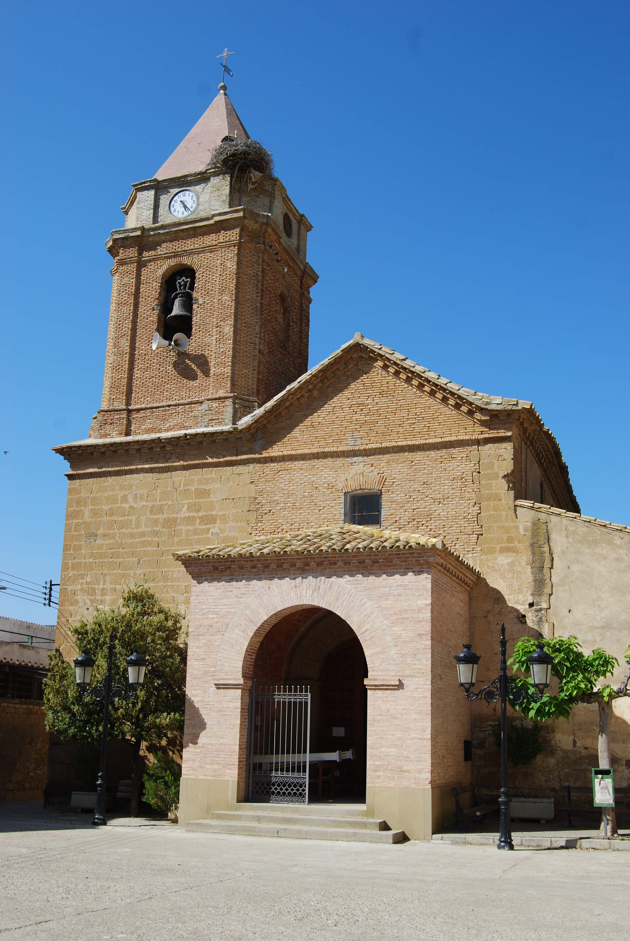 Torre de la Iglesia de la Asunción de Quicena, Huesca, España